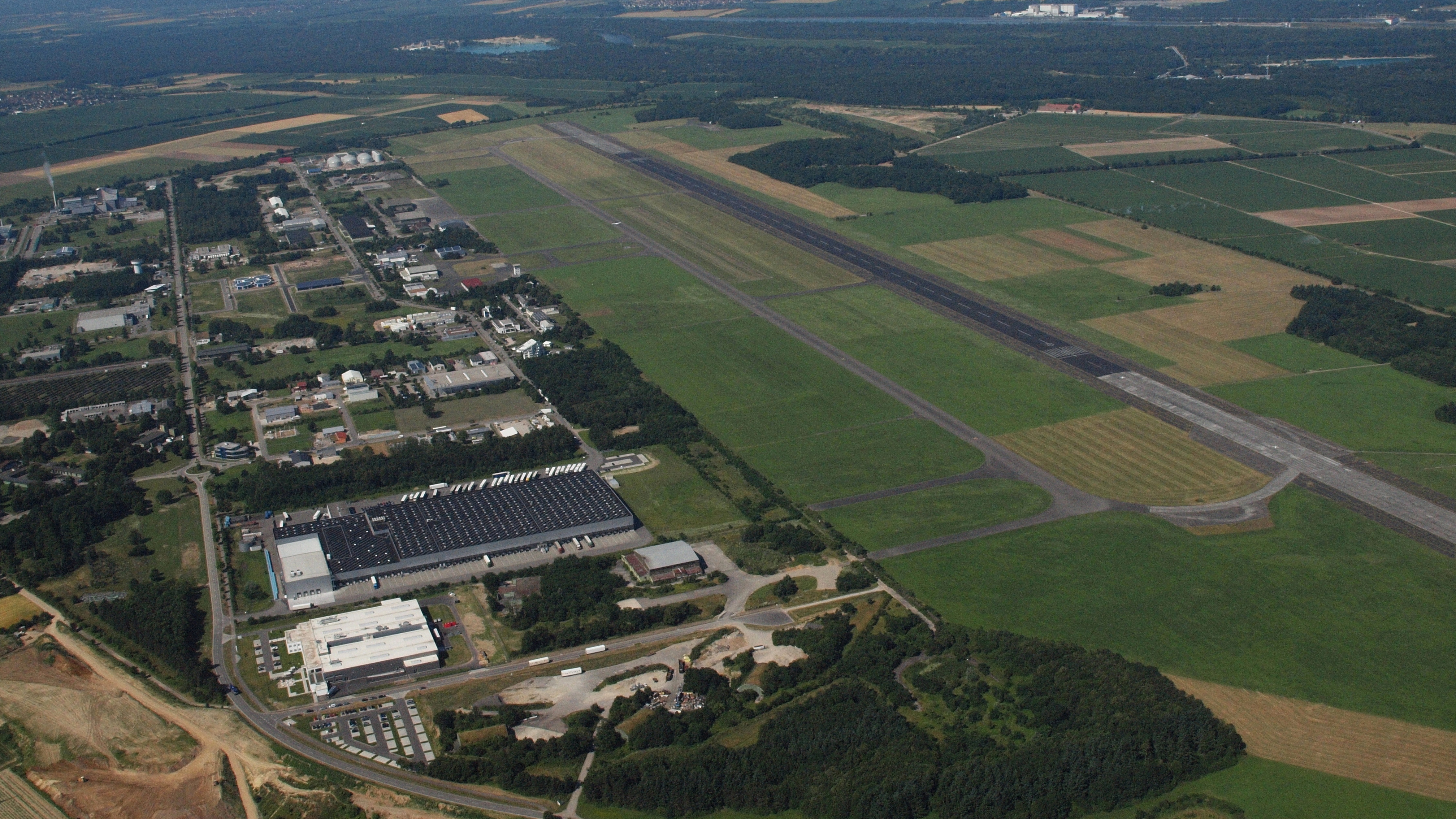 Flugplatz Bremgarten, Eschbach: Luftaufnahme